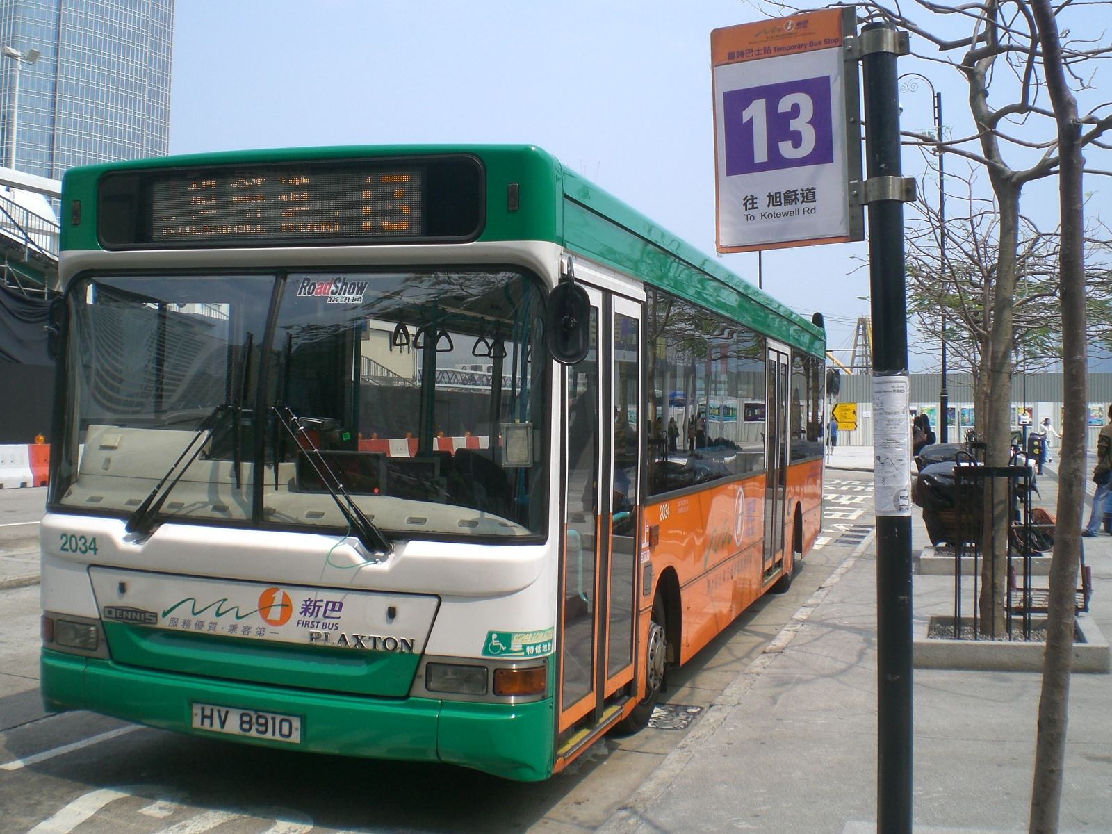 新巴13號線中環（大會堂）巴士總站